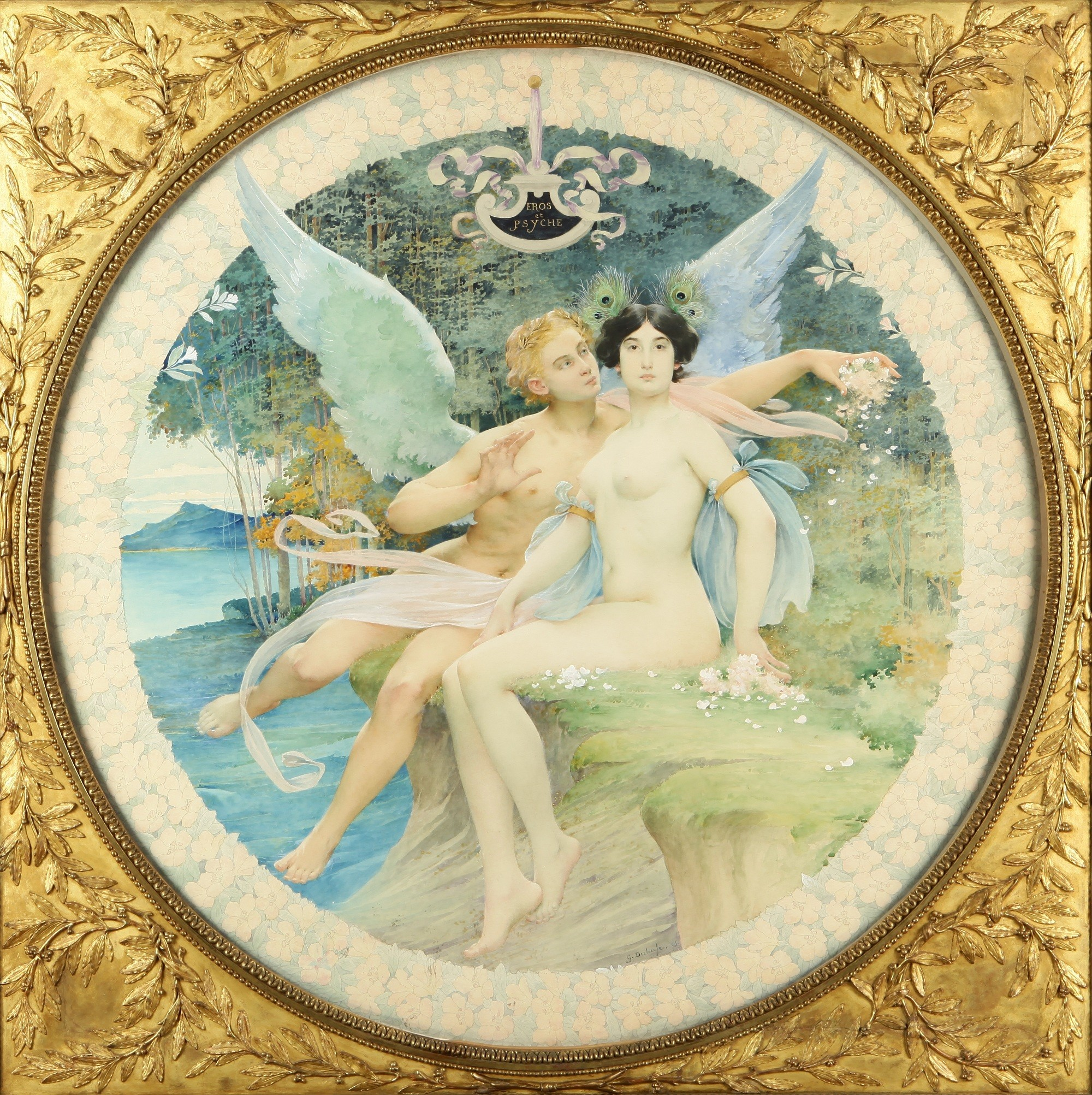 Guillaume Dubufe, Eros et Psyche. Siglo XIX. Diámetro: 119 cm, con marco: 140 x 140 cm, acuarela sobre papel entelado. Inv. 5487.